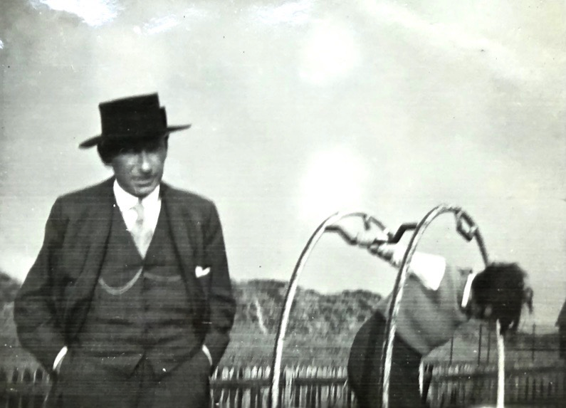 Otto Bamberger (1885–1933) mit seiner Tochter Ruth (1914–1983) auf dem Areal der "Schule am Meer" auf Juist